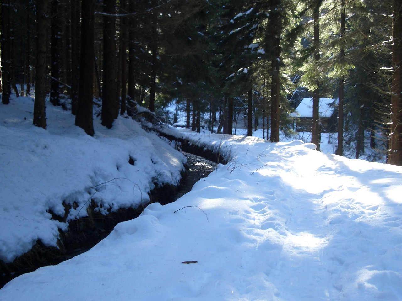 Dammgraben